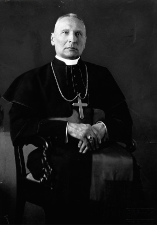 Biskup Kazimierz Michalkiewicz